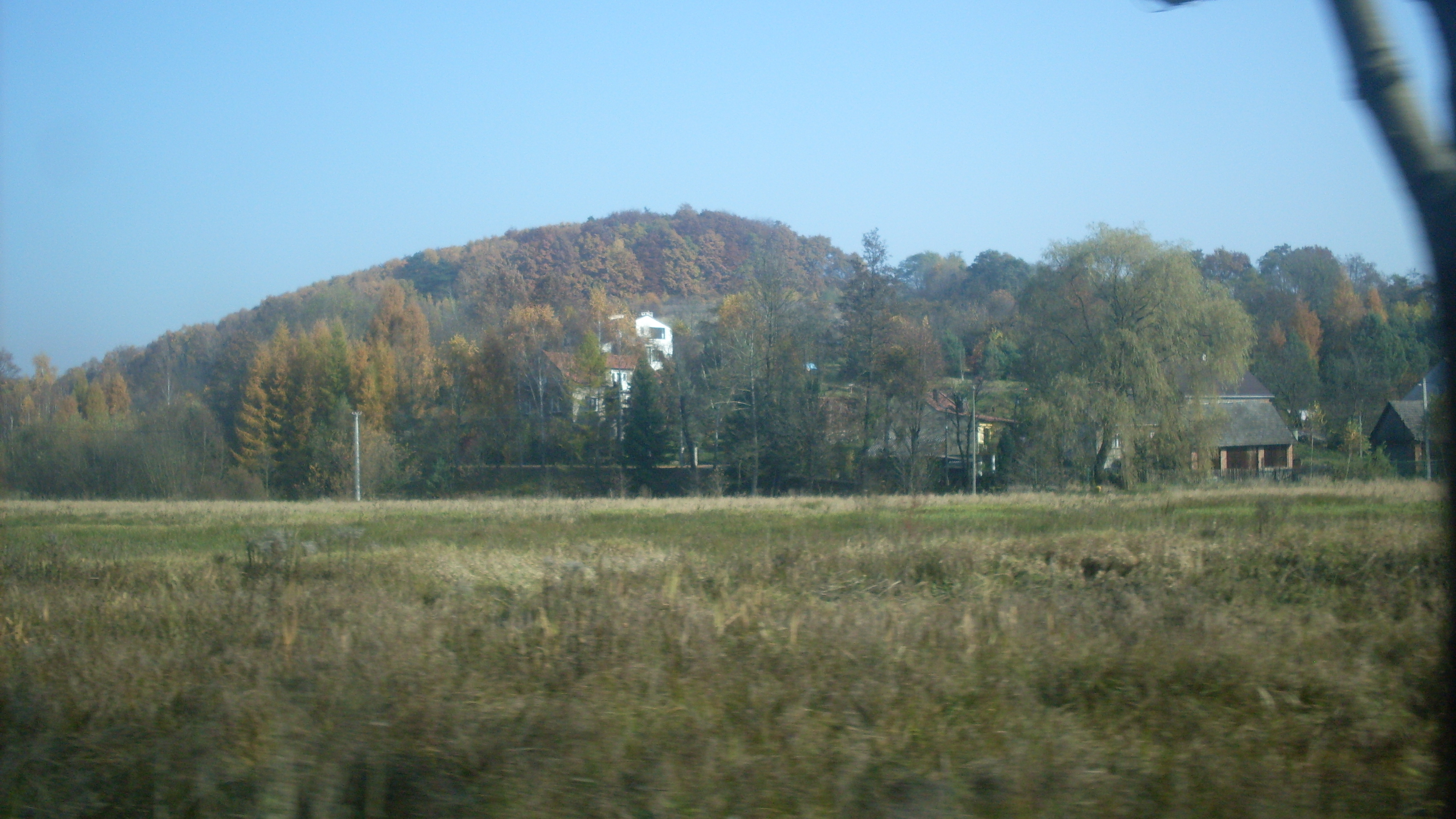 Szczyglice.Bukowina